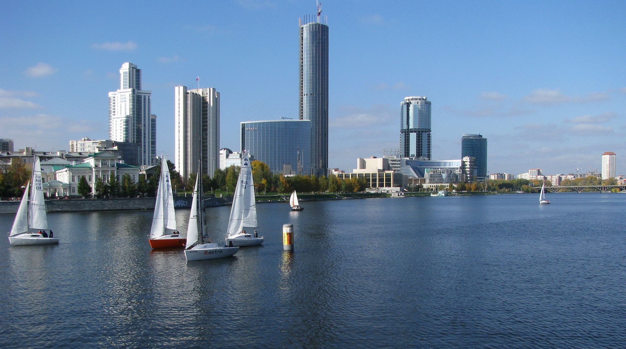 Городской пруд на реке Исеть в Екатеринбурге, сентябрь 2014